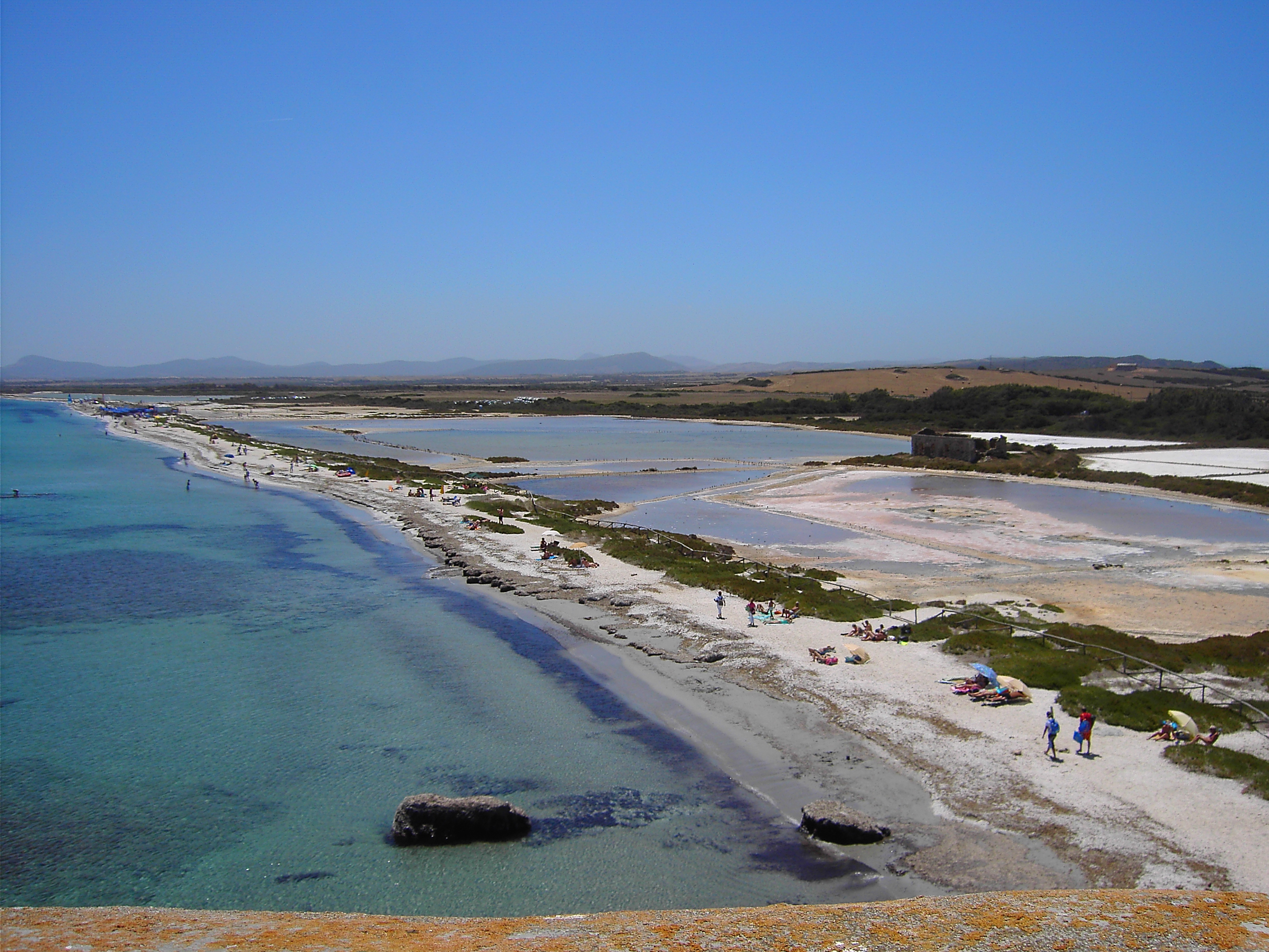 Le Saline Stintino-Sardenya-Italia